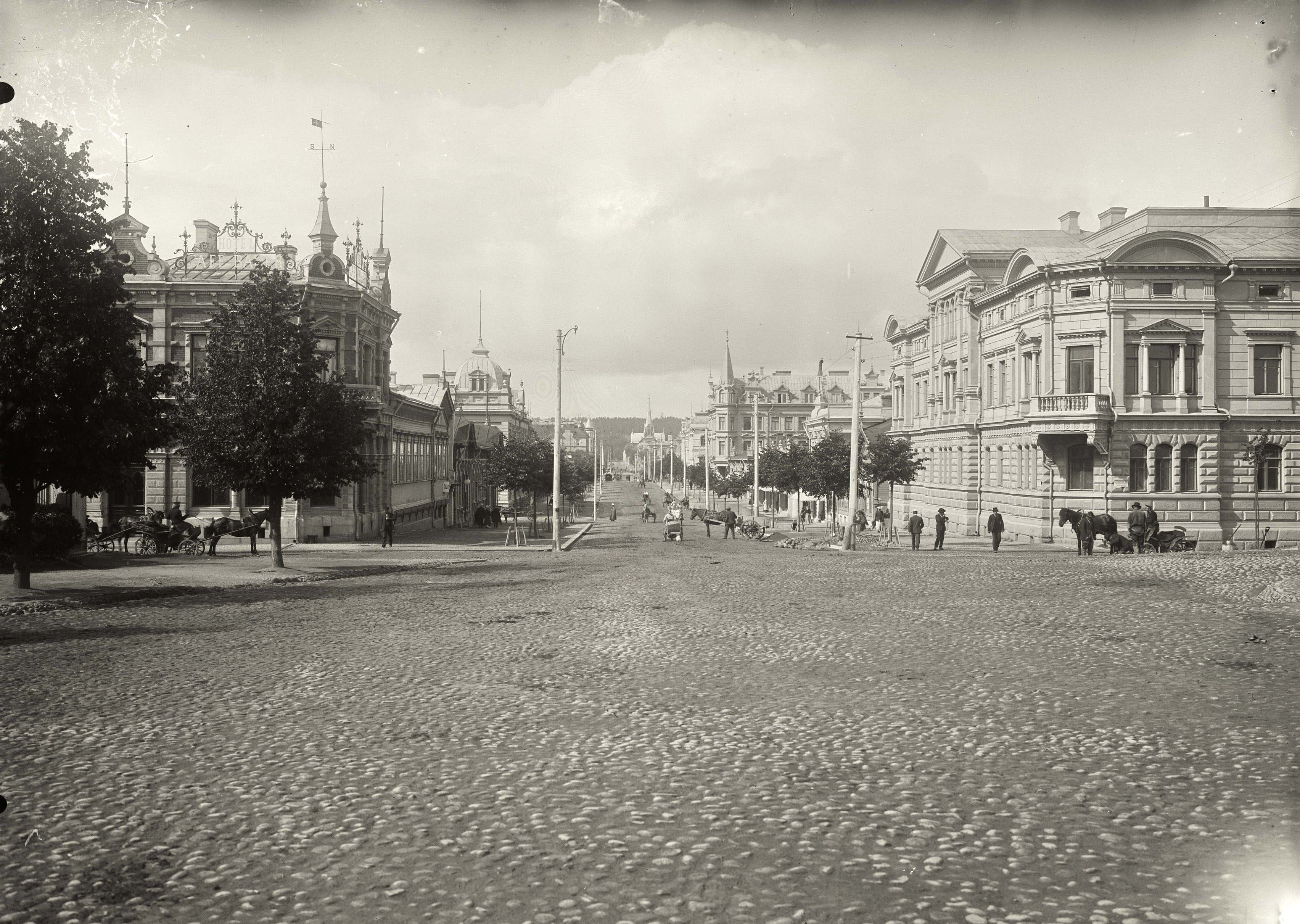 Tammerfors - Tampere ca 1900-1910. By Alex Federley (1864-1932). Åbo Akademi Picture collections - Åbo Akademis Bildsamlingar - Åbo Akademin kuvakokoelmat 1959/400:108. Do you know anything about this picture? Leave a comment below, or .